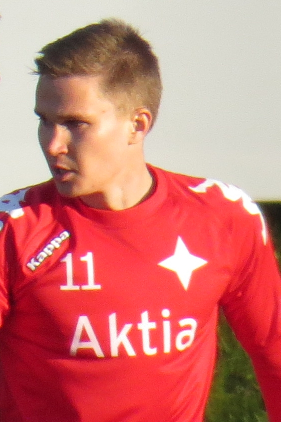 Eero Peltonen, suomalainen jalkapalloilija HIFK:n joukkueessa kaudella 2015.